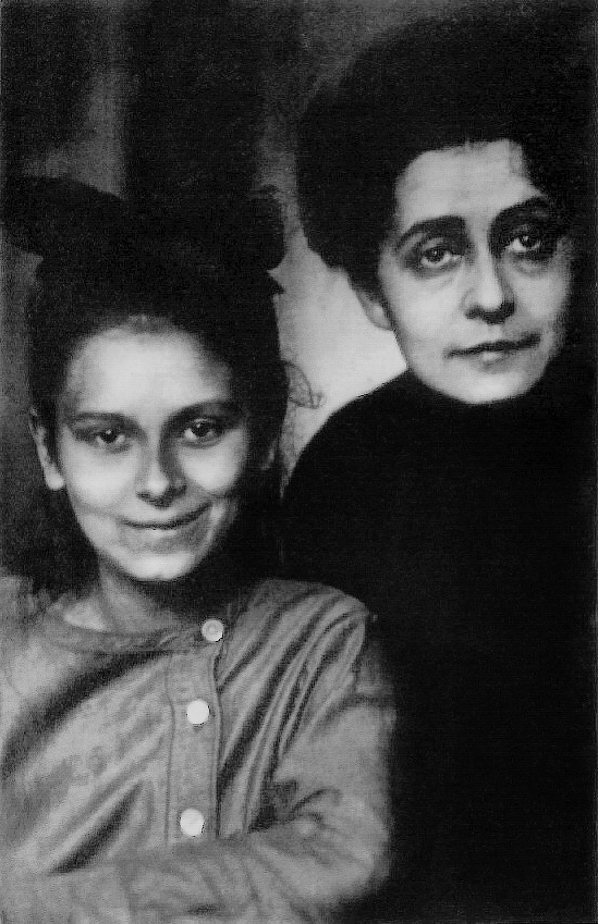 Татьяна Шлёцер с дочерью Ариадной